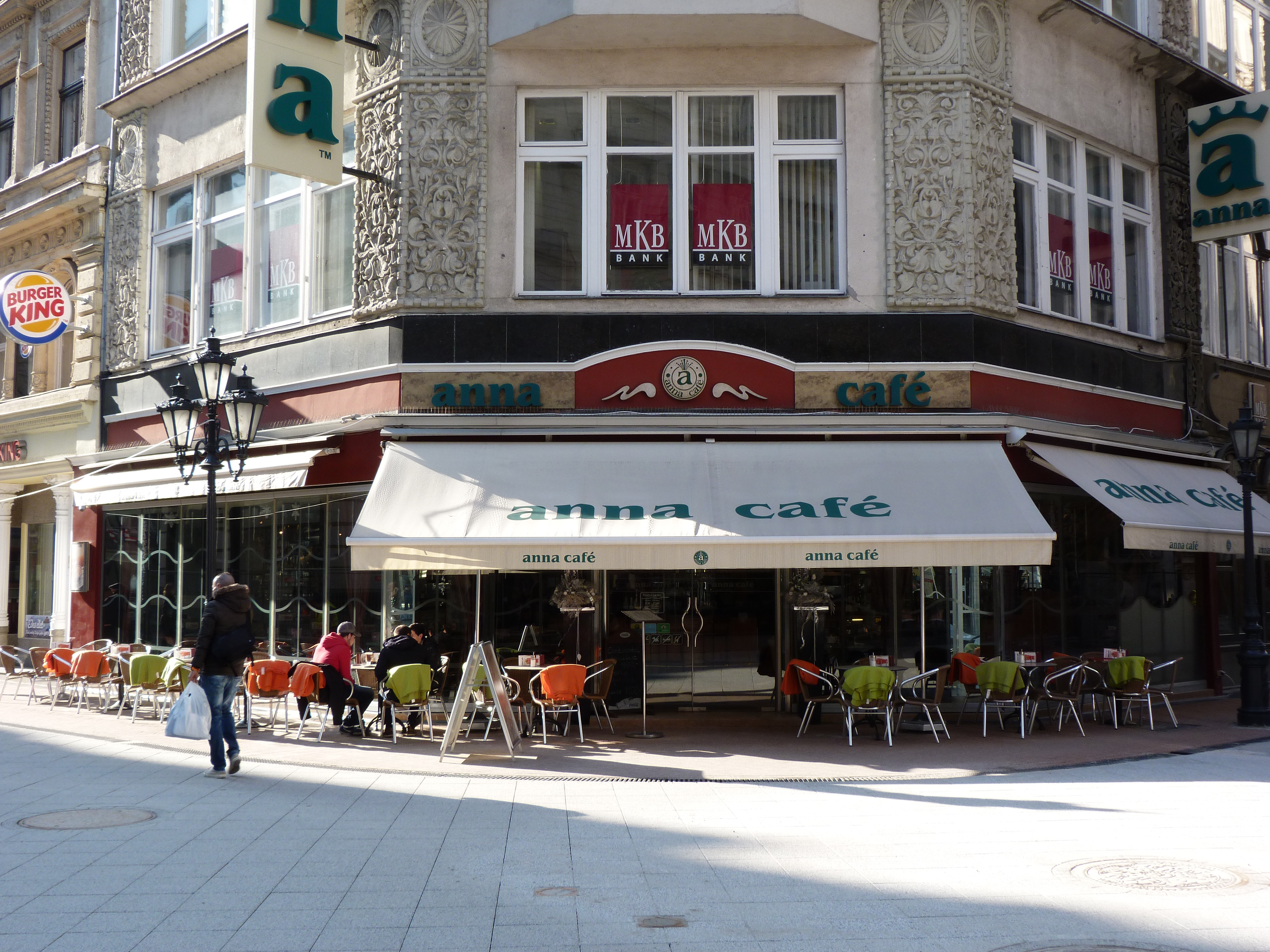 A felvétel 2014. február 24 -én hétfőn készült Budapesten, a Váci utcában. Anna Kávézó. ©© Derzsi Elekes Andor, Budapest, 2014, You are authorised to use these photos and vids under Creative Commons – even for commercial, for profit purposes. Photos must be attributed to Derzsi Elekes Andor. All of the photos and vids in the Metapolisz DVD line are under Creative Commons and can be used even for commercial – for profit – purposes. Recommended Citation Derzsi Elekes Andor: Metapolisz DVD line